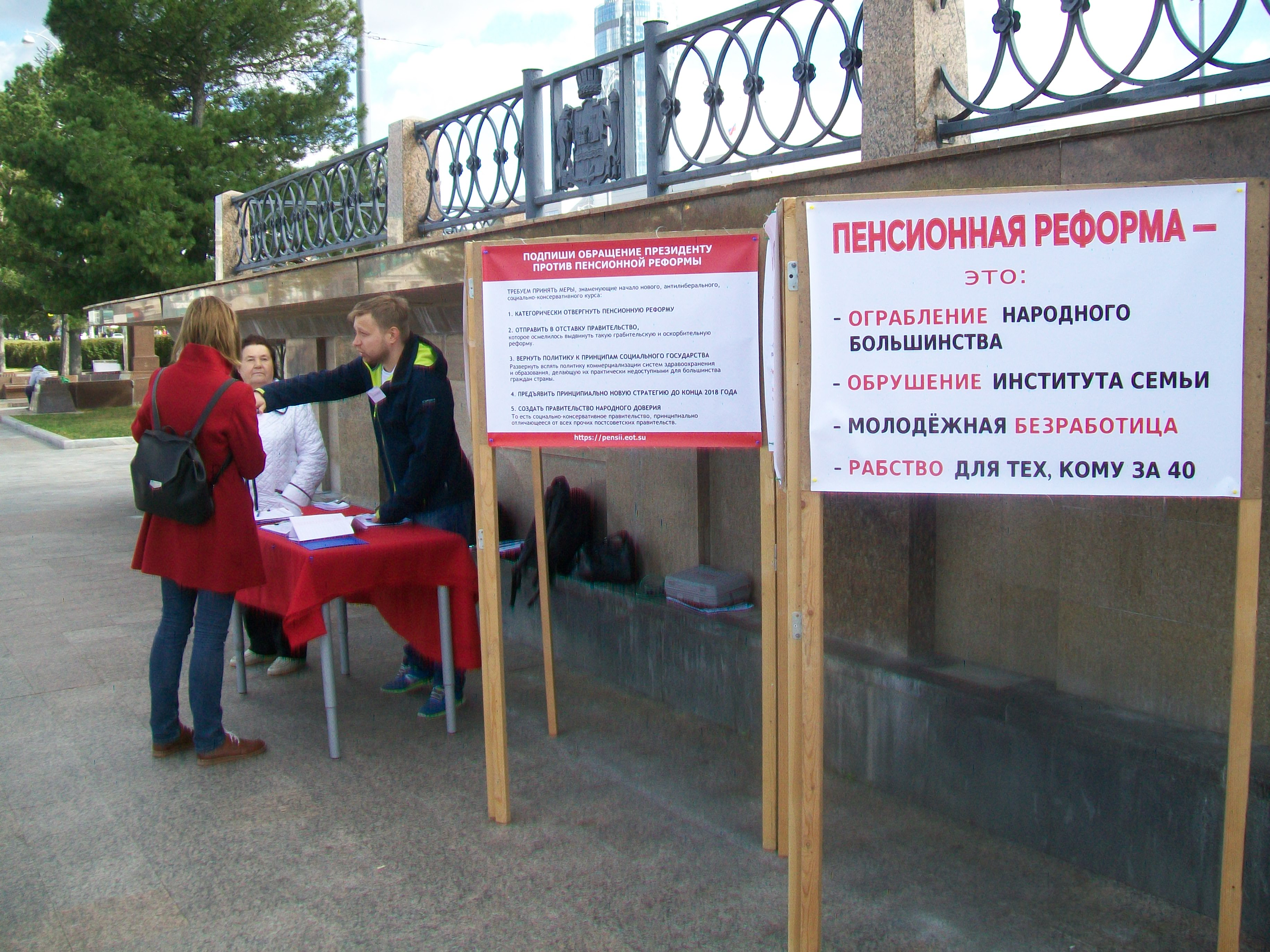 "Суть времени" собирает в Екатеринбурге подписи против пенсионной реформы. Екатеринбург. 15 сентября 2018 года